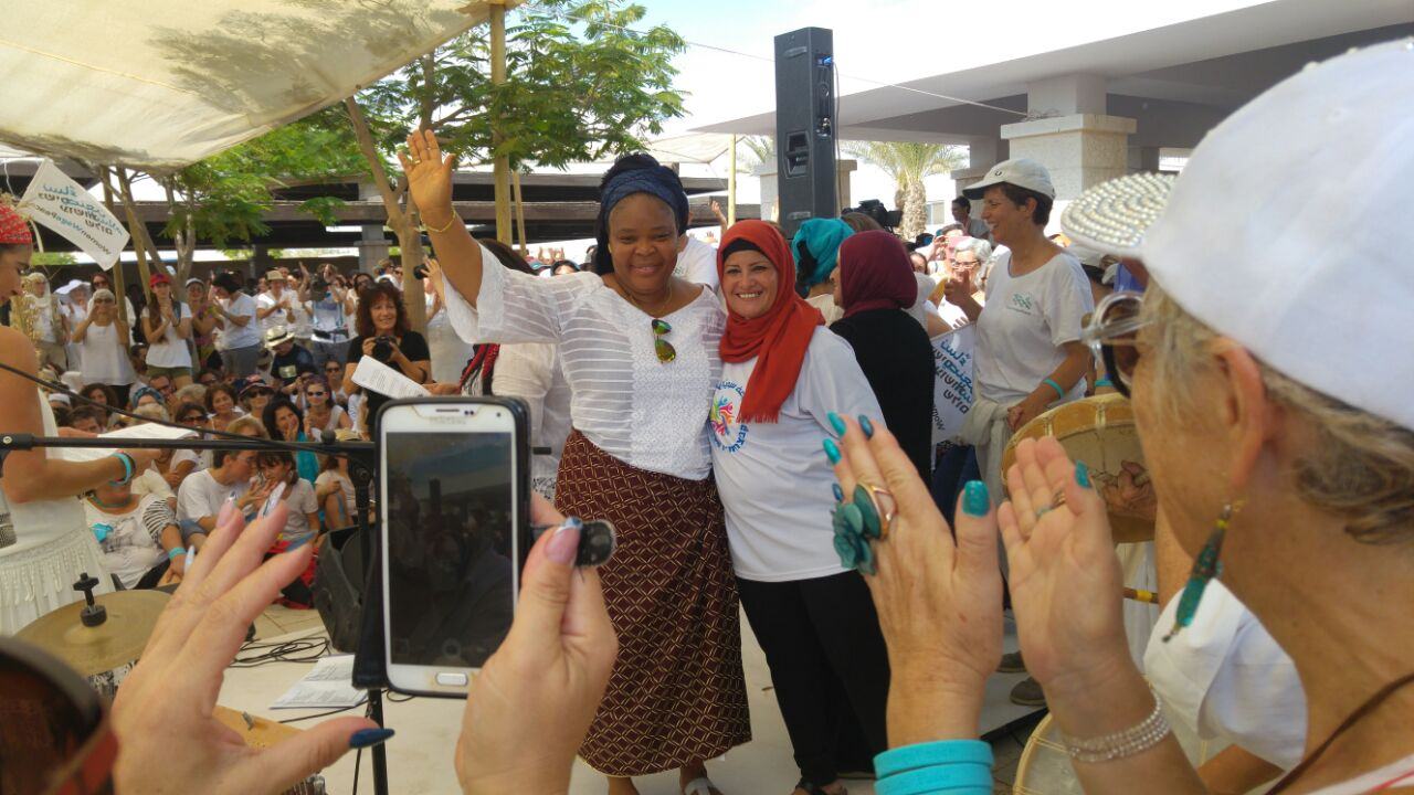 ליימה בואי באירוע מקסר אל יהוד ,על נהר הירדן 5ק"מ צפונית לים המלח בסיום צעדת נשים עושות שלום.